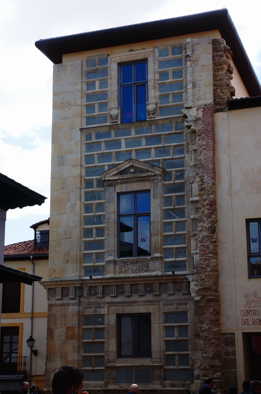 Palacio del Conde Luna